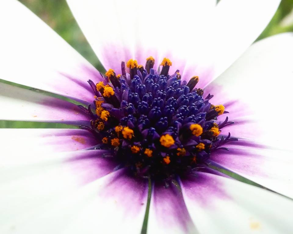 Dimorphotheca ecklonis como planta ornamental en jardín de Argentina.